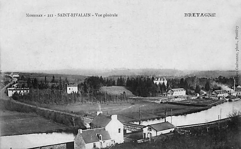 Vue générale de Saint-Rivalain, avec au centre la halle marchandise de la gare et le pont routier sur le Blavet et à droite l'usine de papier. L'écluse de Boterneau est hors champ sur la droite.